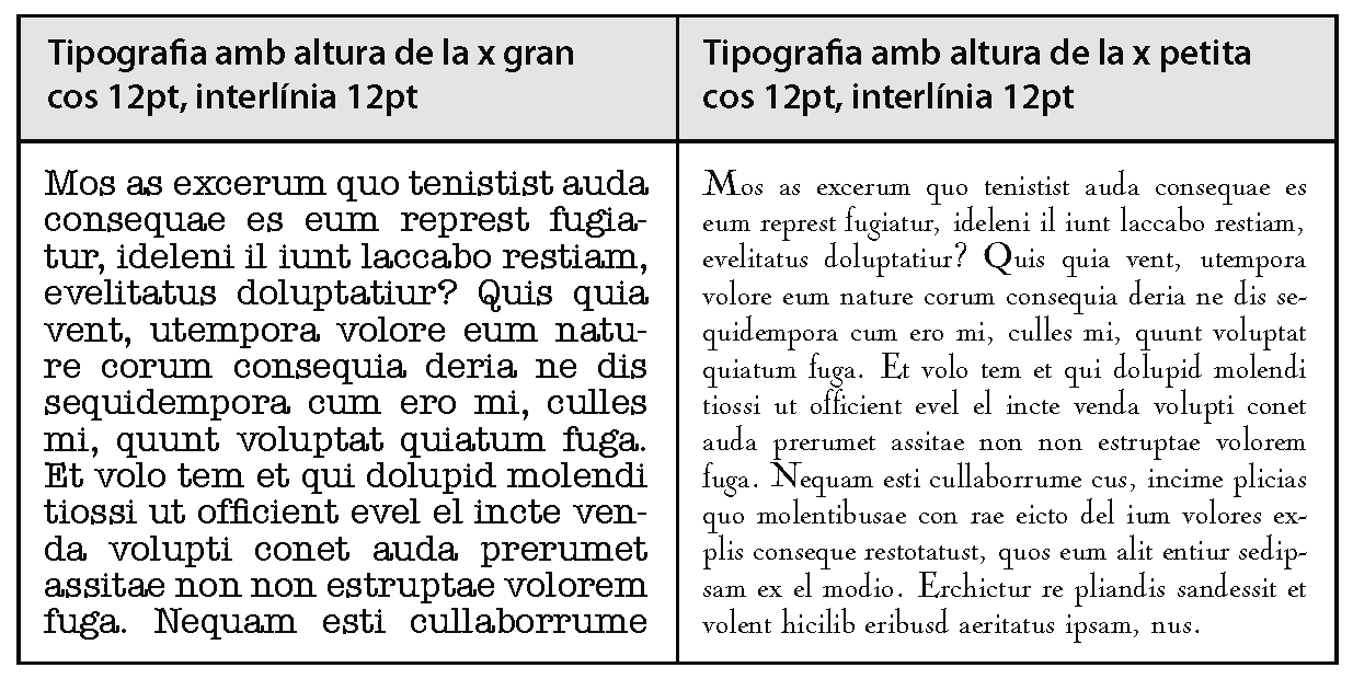 Comparativa entre dos texts del mateix cos amb altura de la x diferent.